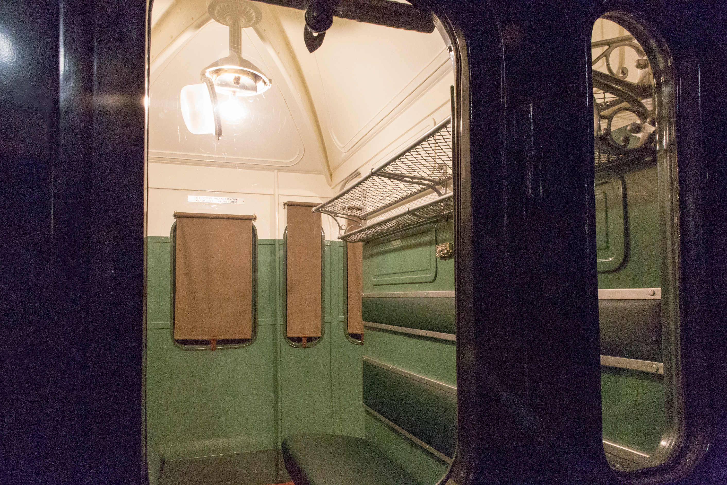 Compartiment ouvert d'une C11 "Arts Déco".